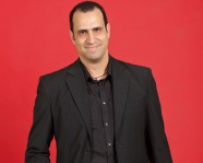 ליאור כלפון